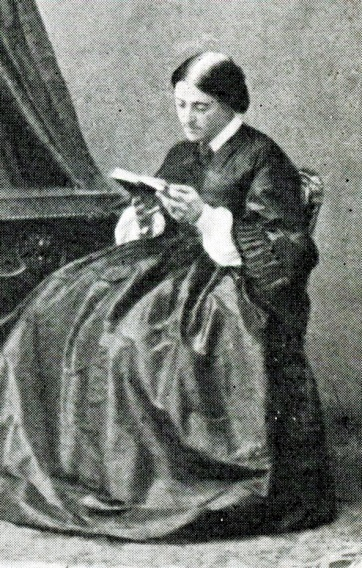 Marguerite de Blic, Tertiaire Dominicaine organisatrice du pèlerinage des bannières à Lourdes en 1872